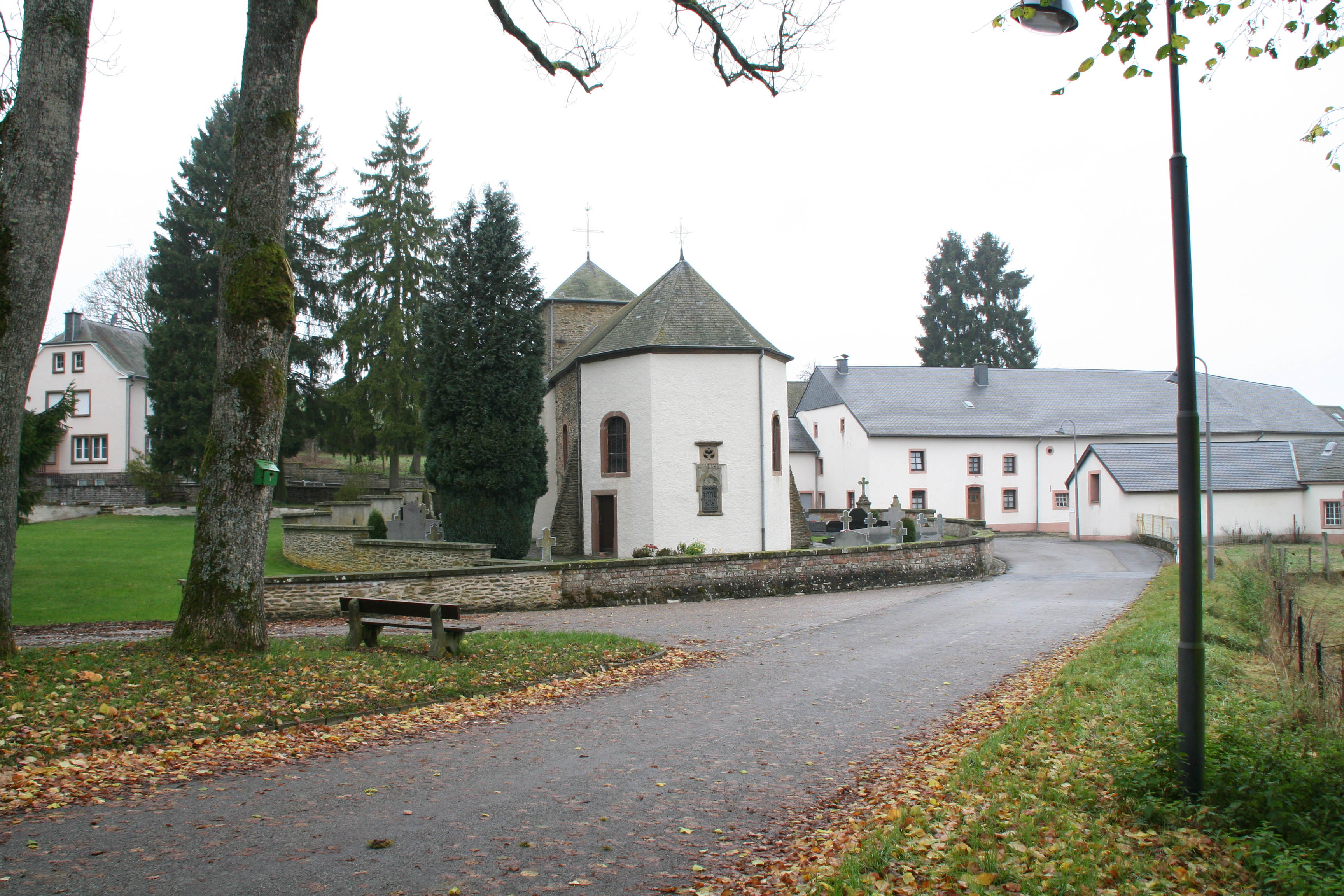 Randschelt. Kategorie:Gemeng Wal